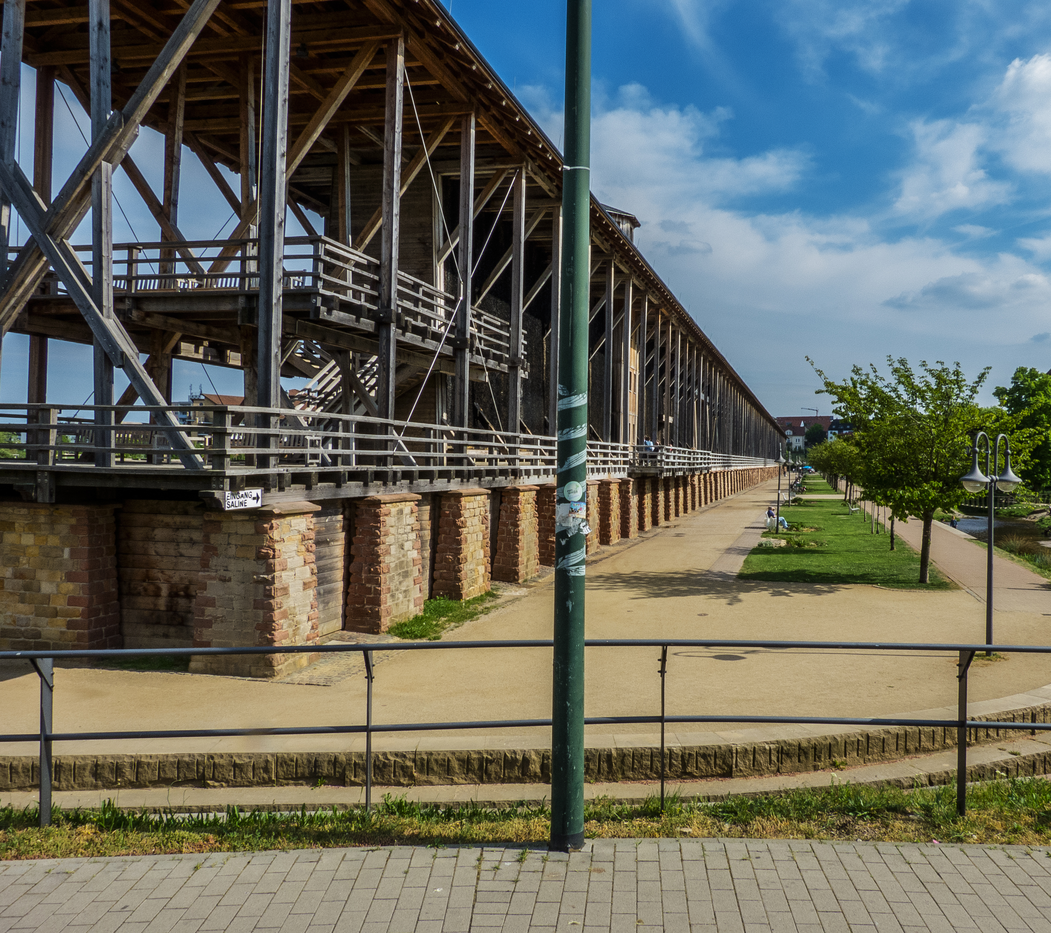 Gradierwerk in Bad Dürkheim, Rheinland-Pfalz